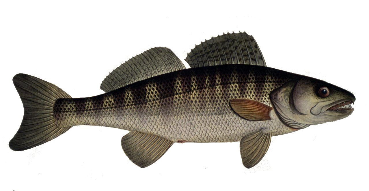 Sander lucioperca